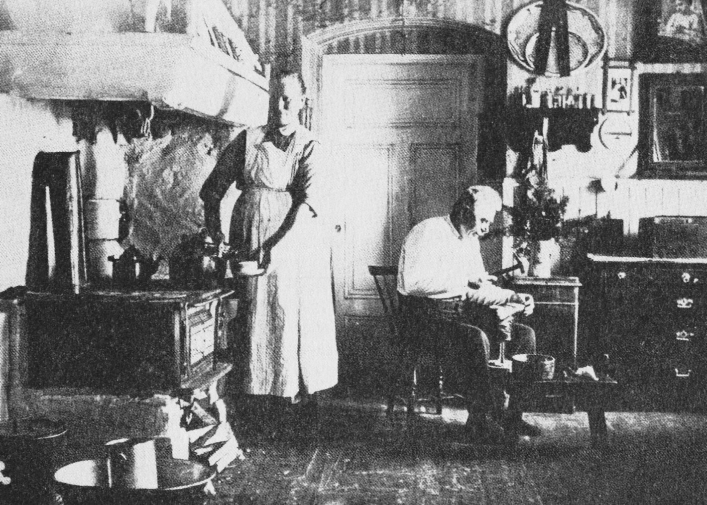 Margareta och Karl-Erik Erikssons hem på Hammarbacken 1920